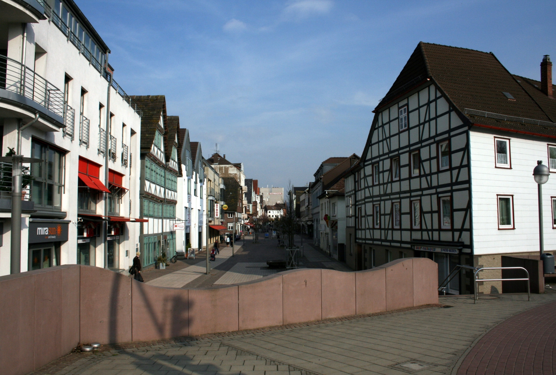 Holzminden: Obere Straße (Stadtzugang von der Weserbrücke)